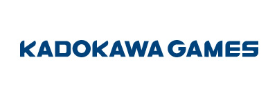 Logo oficial de Kadokawa Games.